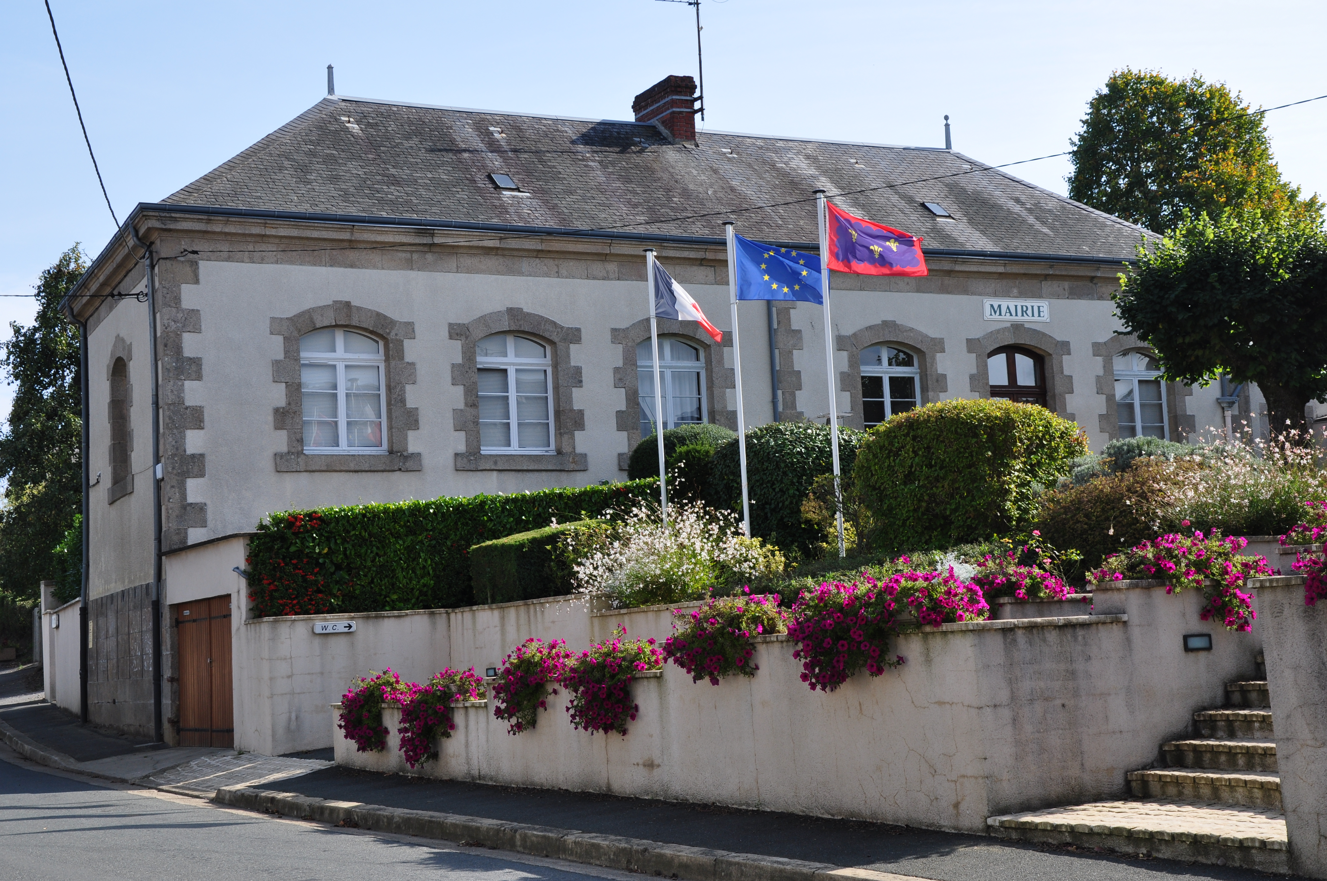 Mairie de Bazaiges (Indre)